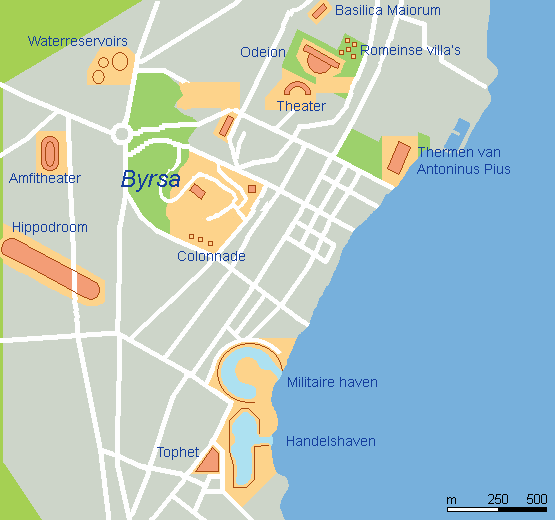 Kaart van Carthago met hedendaagse ruïnes